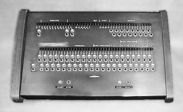 Řidící konzola počítače Gier